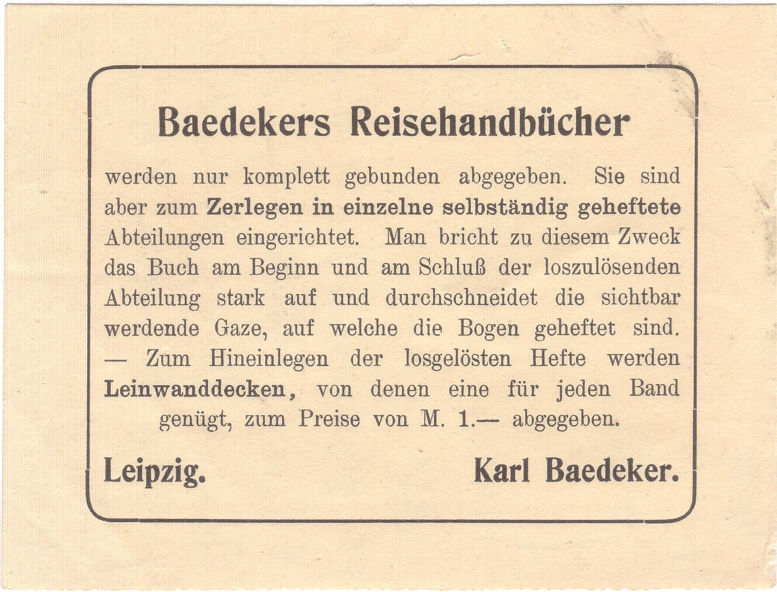 Baedekers, Hinweiszettel zum Zerlegen von Bänden